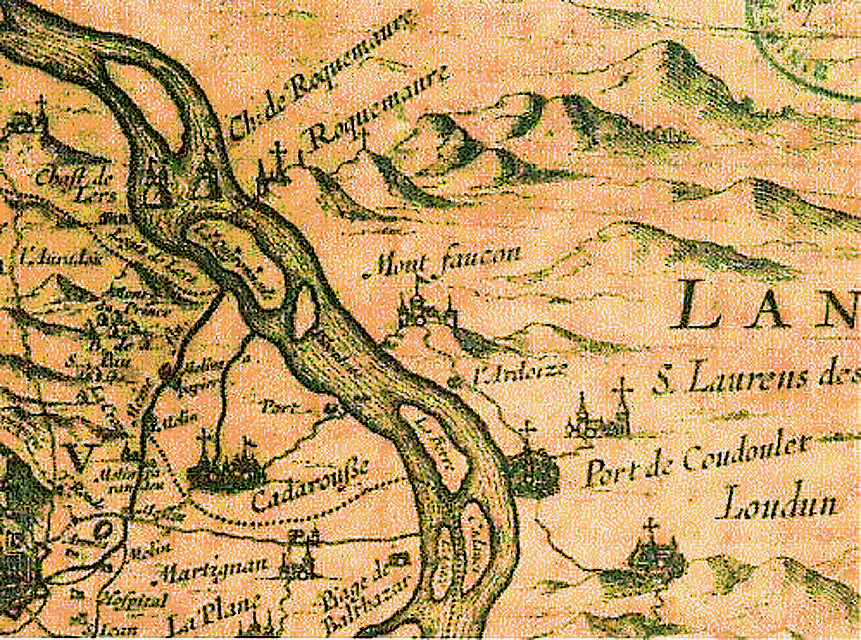 Carte du XViiie siècle représentant la viguerie de la Côte du Rhône